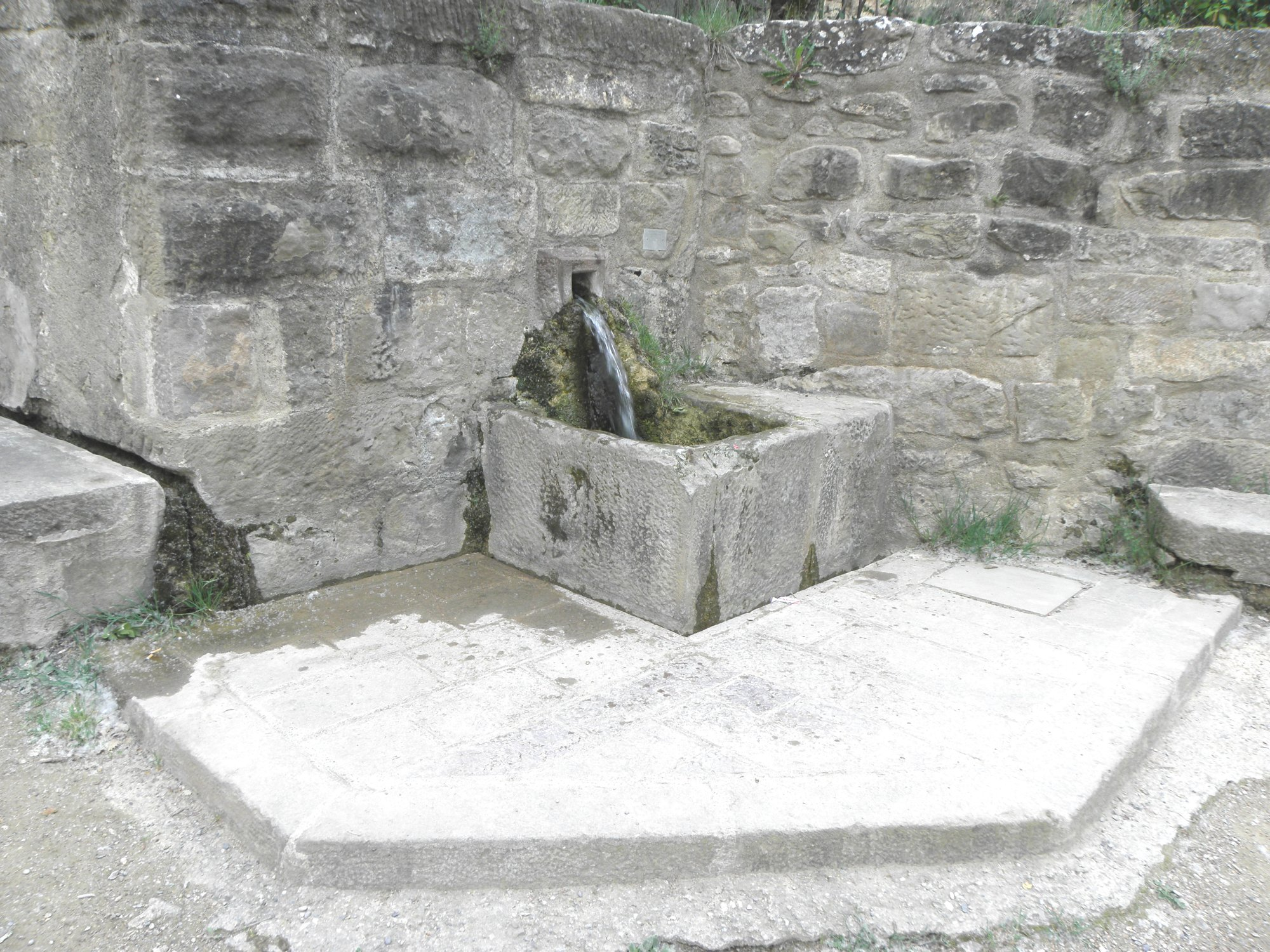 La Mare de la Font, al municipi de Solsona (Solsonès)